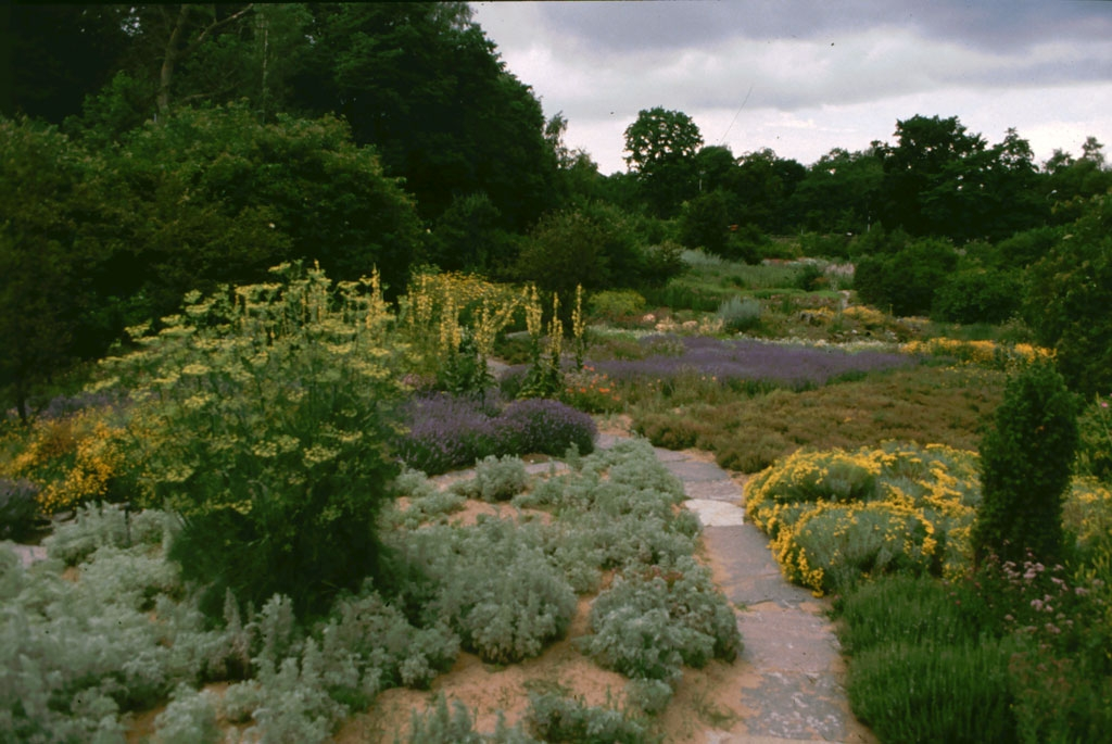 Pflanzengesäumter Weg im Aromagarten